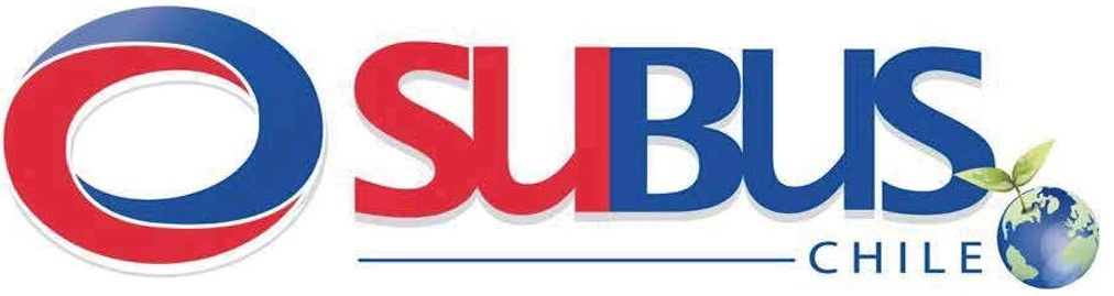 Logos de las empresa del Transantiago.